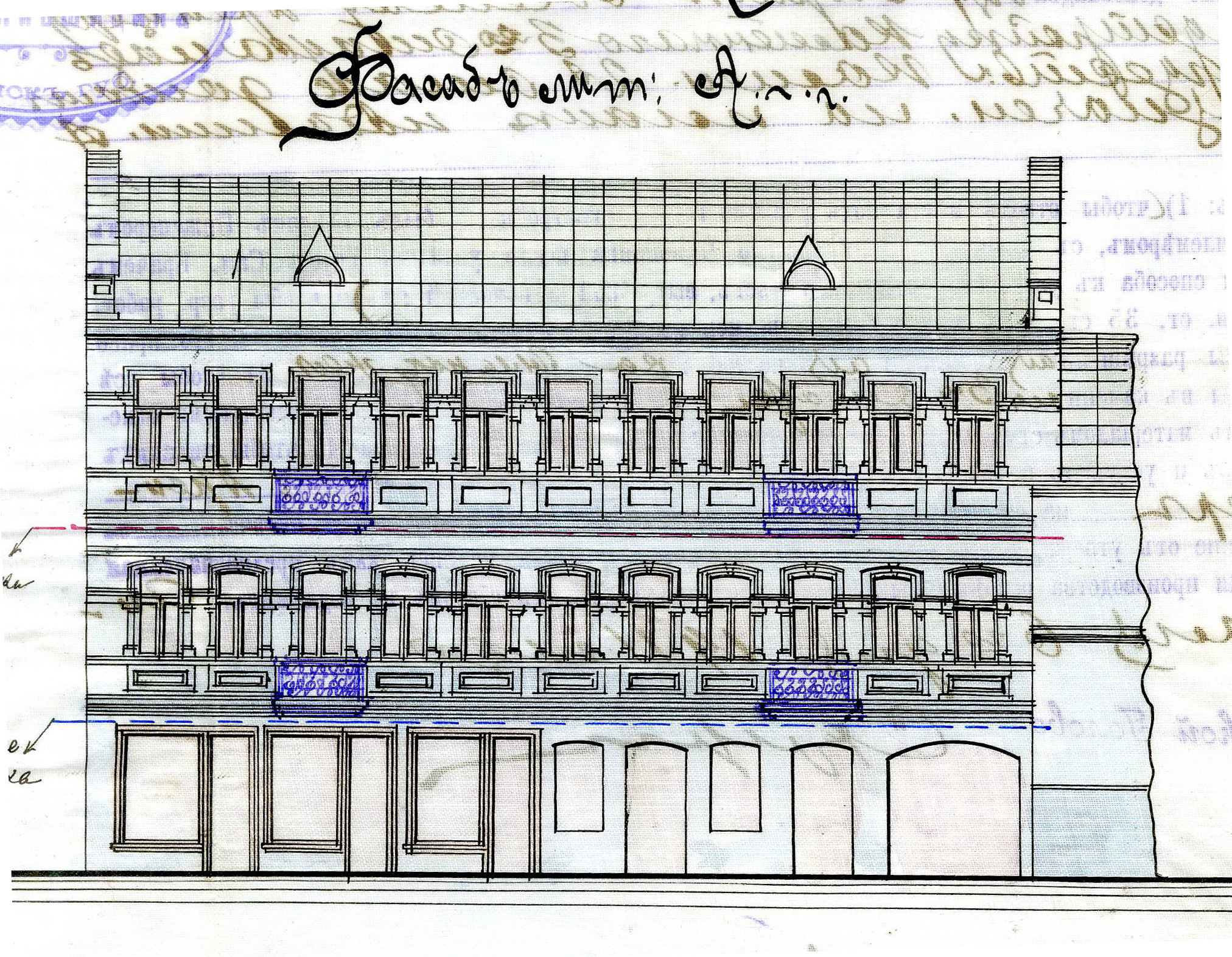 Беларуская (тарашкевіца): Менск (Miensk), вуліца Фэліцыянаўская (vulica Felicyjanaŭskaja). Праект рэканструкцыі і перабудовы мураванага трохпавярховага жылога дома Г. Дрэйцара (Drejcar)